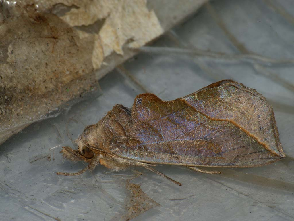 Exemplar found: Russia, Moscow Oblast, Odintsovsky District, Zvenigorod Biological Station, 16.07.2011, by light МО, Одинцовский р-н, Звенигородская биостанция - Нижние дачи, 16.07.2011, на свет